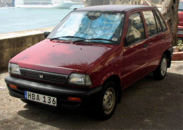 Maruti / Suzuki 800 hatchback